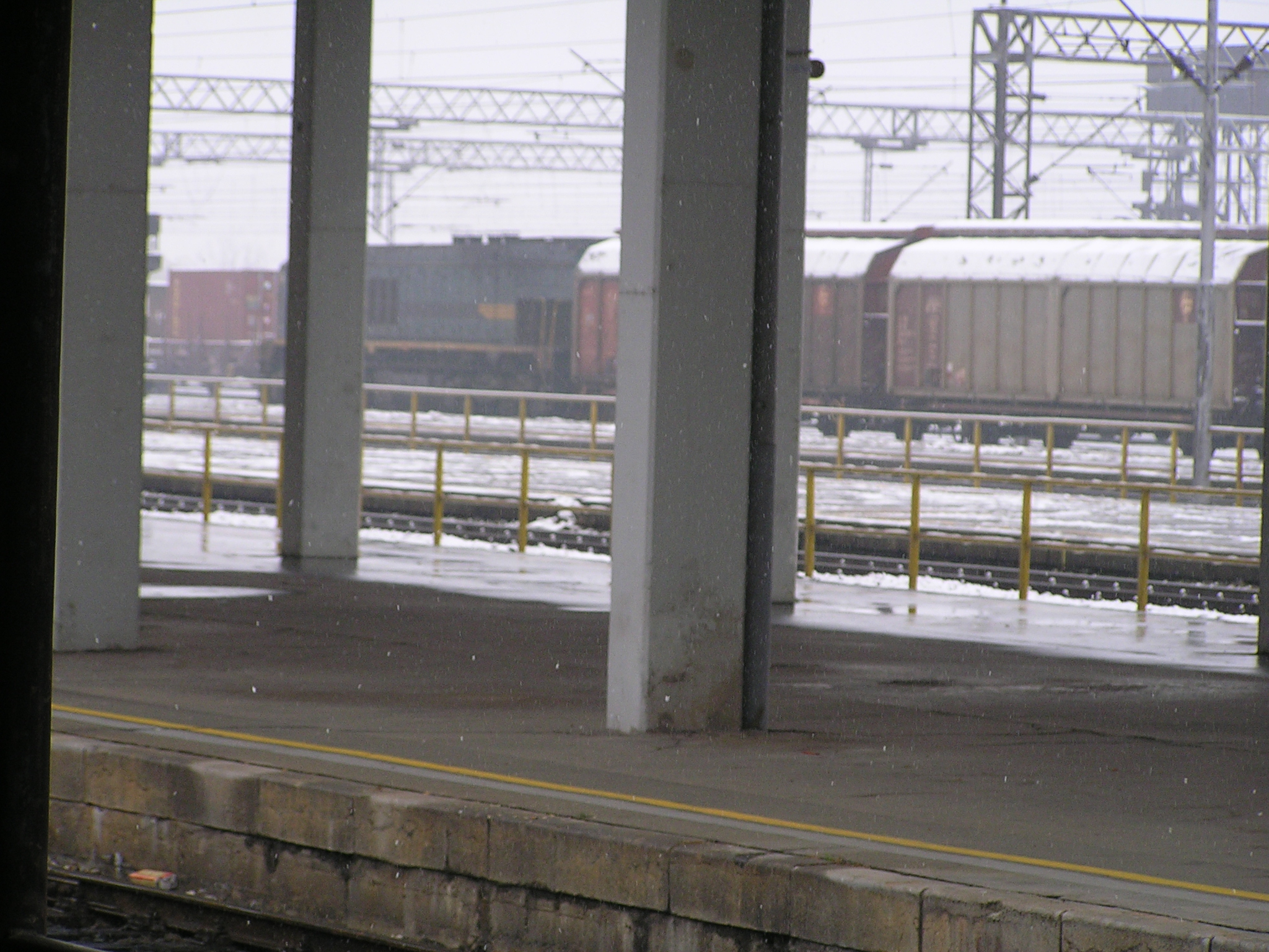 Teretni vlak čeka polazak.